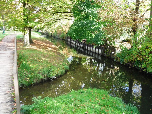 Confluence de l'Yvette et de la Mérantaise à Gif-sur-Yvette (91)